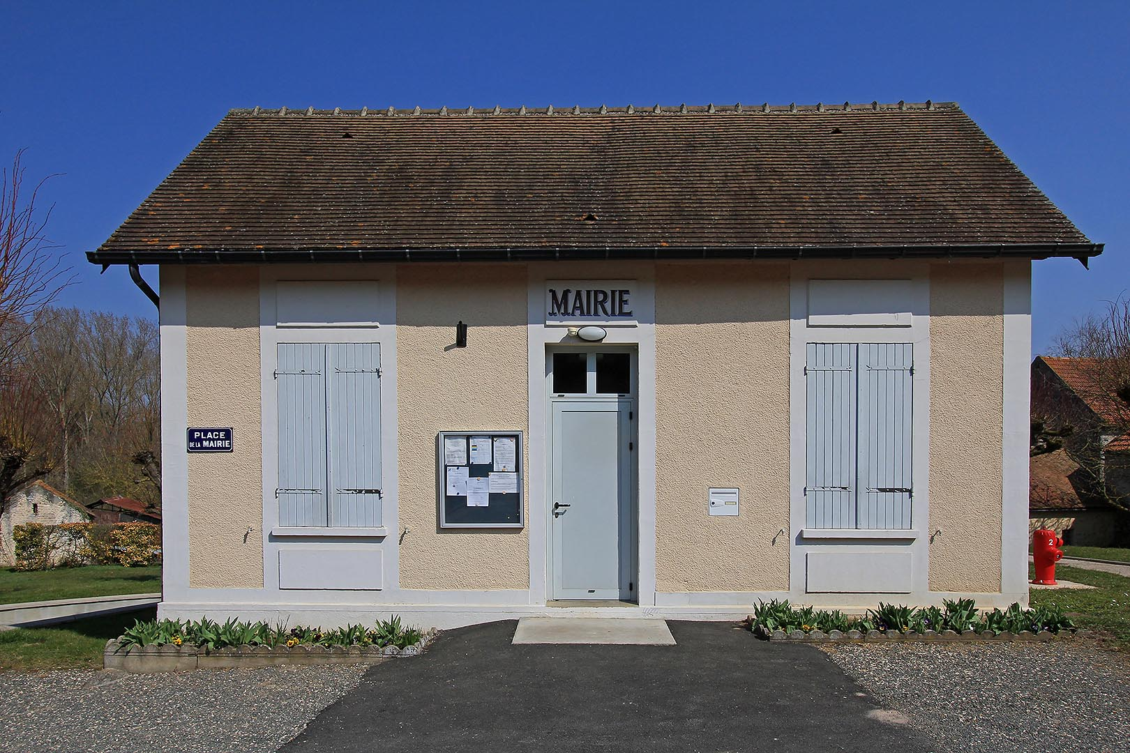 Mairie d'Arrancourt